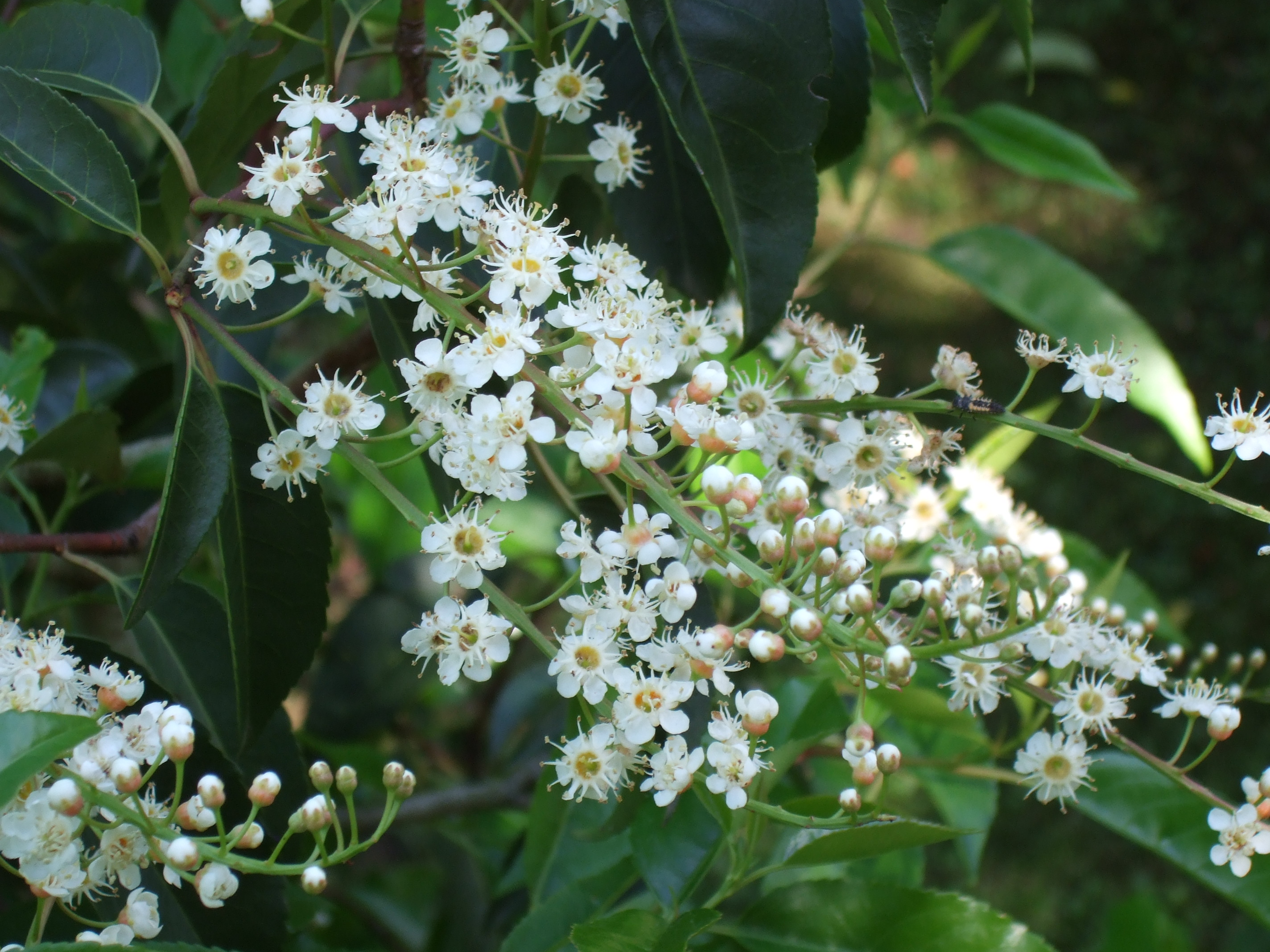 Schloss Hohenheim - Prunus lusitanica Iberische Lorbeerkirsche